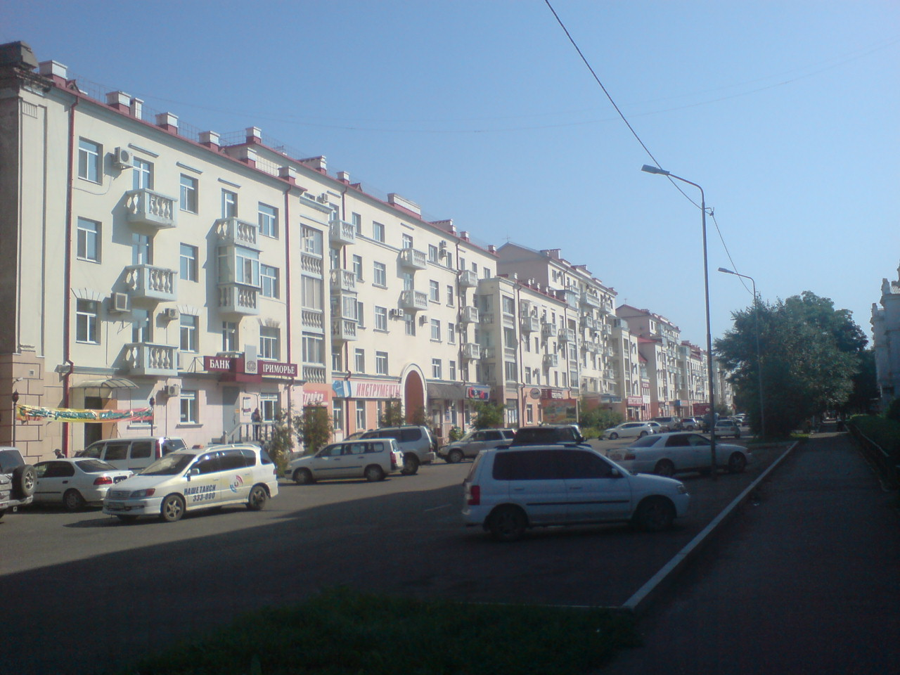 Жилой дом: улица Пушкина, 17, Уссурийск, Приморский край